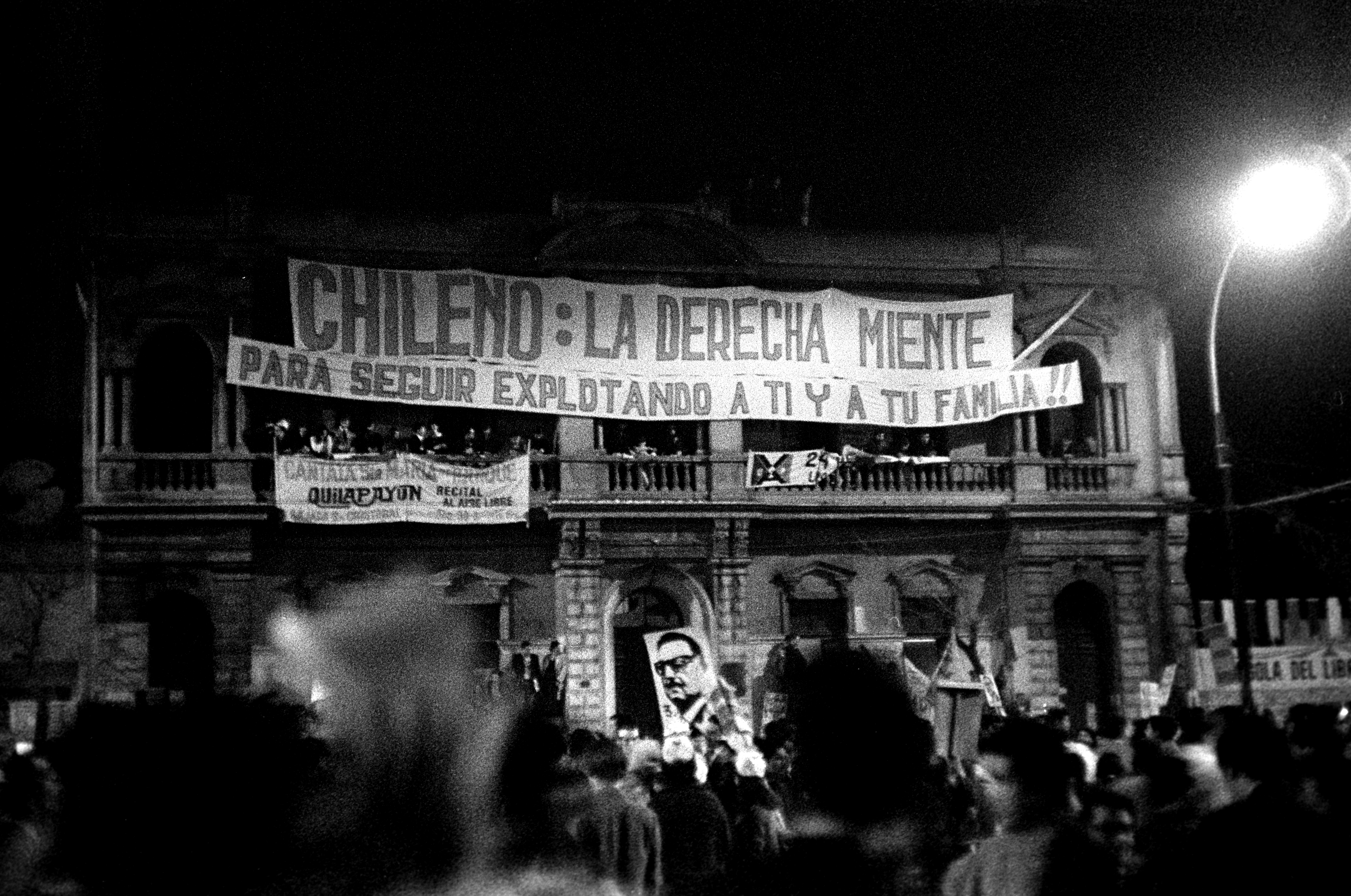 Foto tomada el día que ganó Allende. Celebración en la calle. La fotos fueron tomadas sin flash con una película de ASA 1000. Muy granosas.